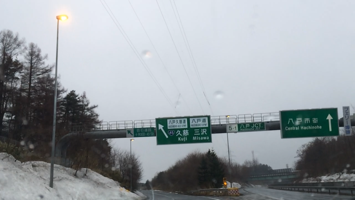 八戸JCT 第一分岐ポイント